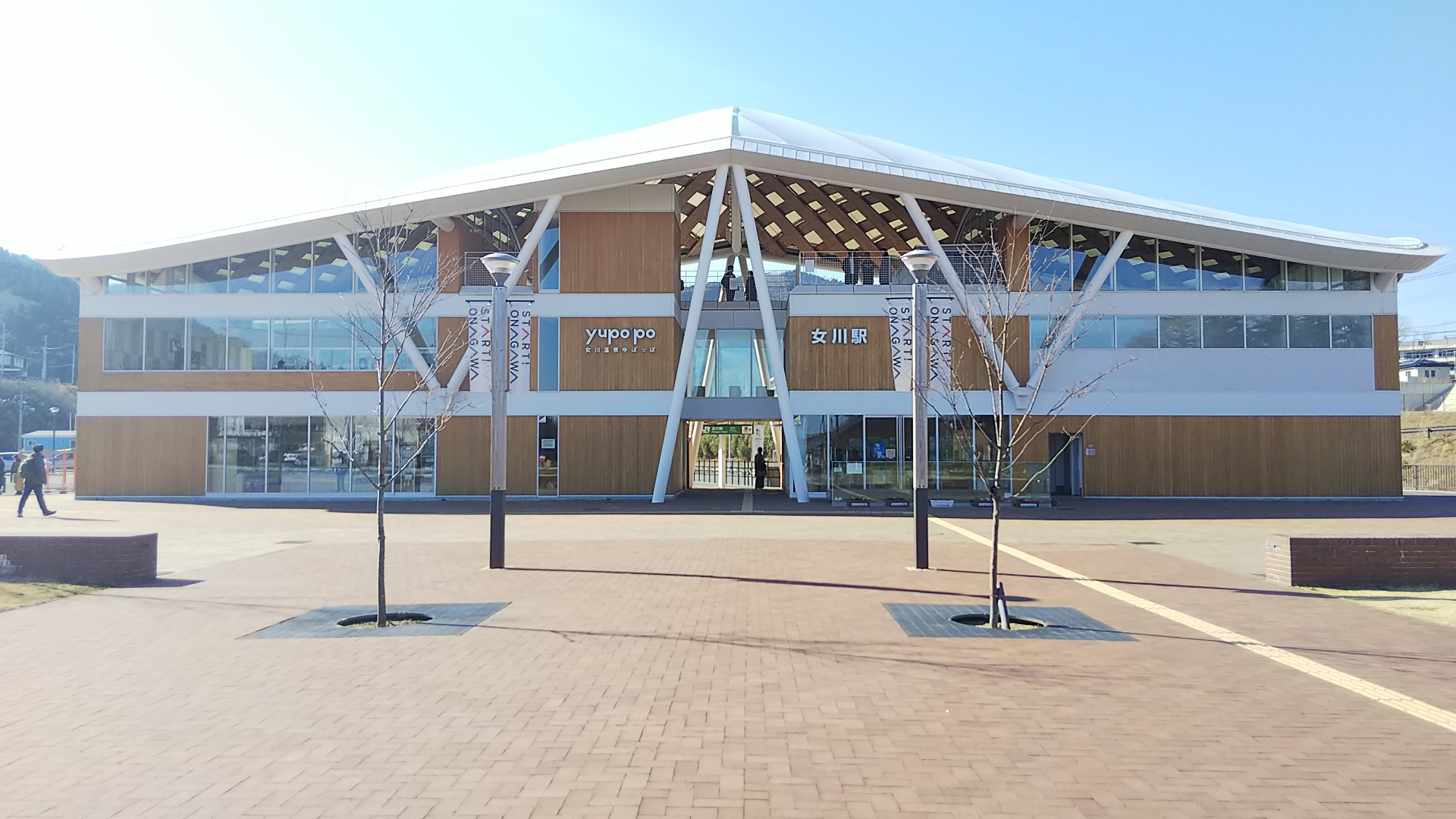 女川駅駅舎（2019年3月）